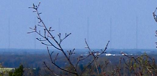 Émetteur de Sainte-Assise depuis le Point de vue du Camp de Chailly, dans la Forêt de Fontainebleau près de Barbizon, Seine-et-Marne (77)